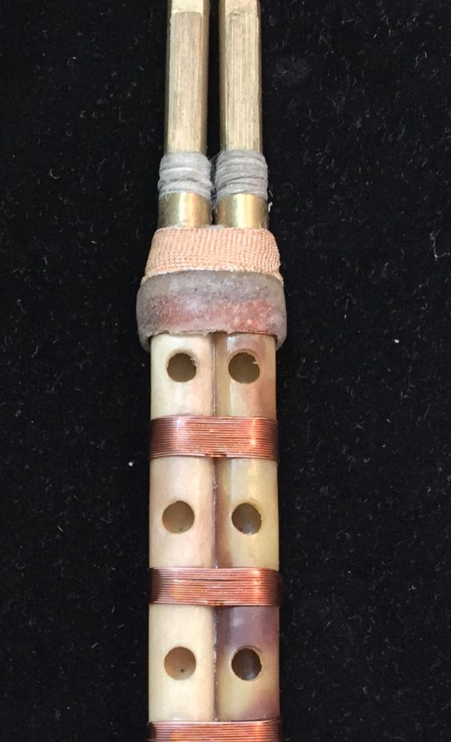 تصویری از قشمه و سرساز برنجی